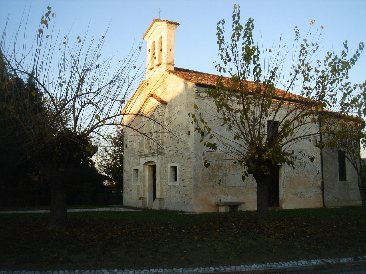 Versuta, chiesetta di Sant'Antonio Abate, luogo della gioventù pasoliniana